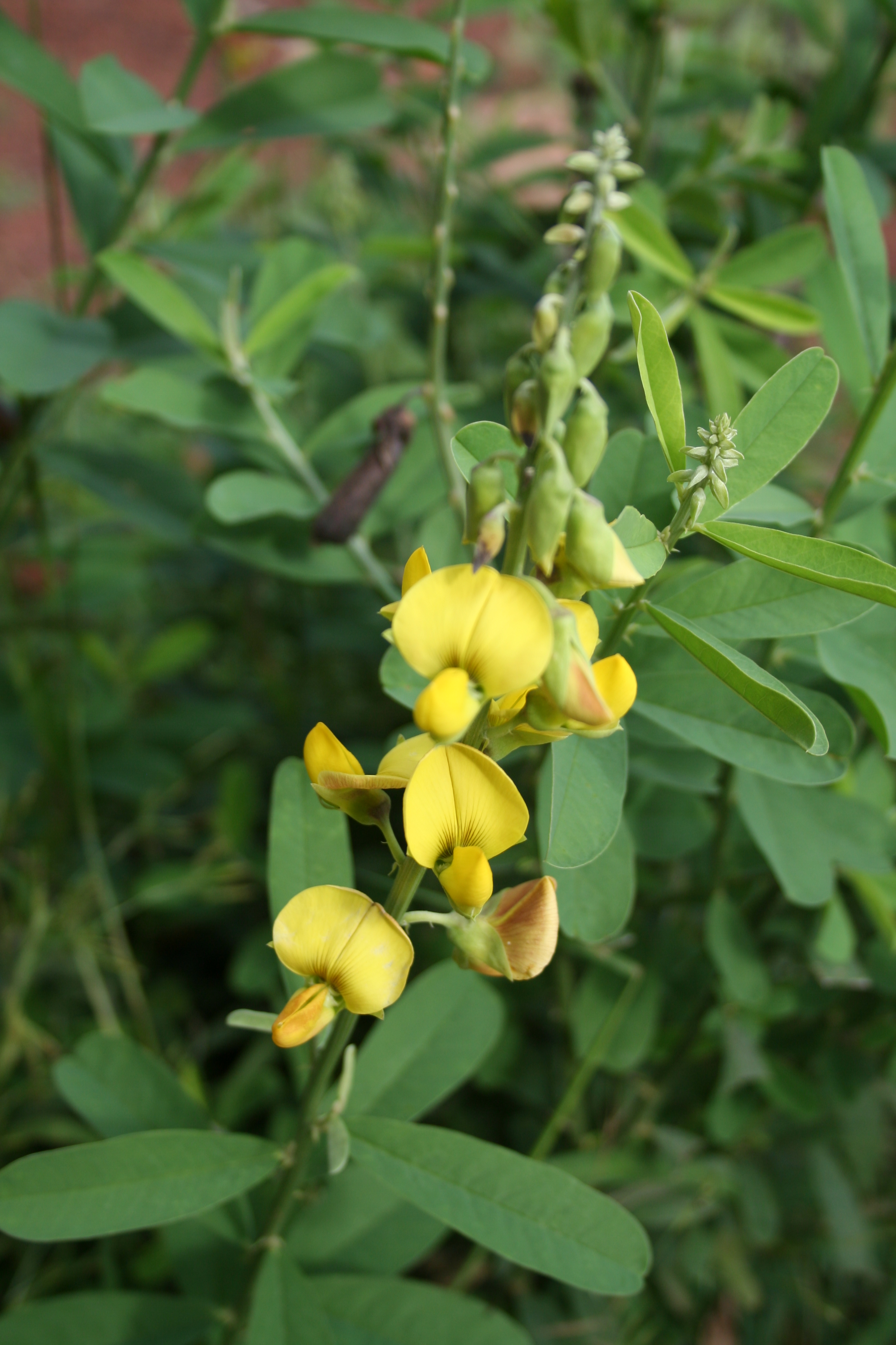 Crotalaria retusa, SW Burkina Faso